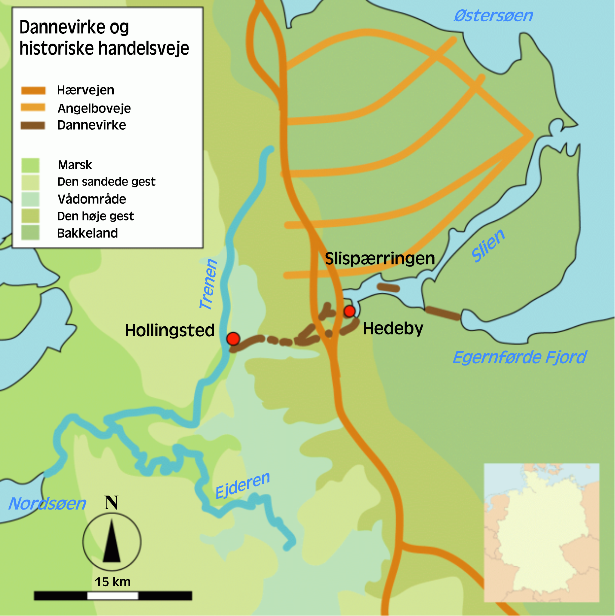 Dannevirke/Danewerk